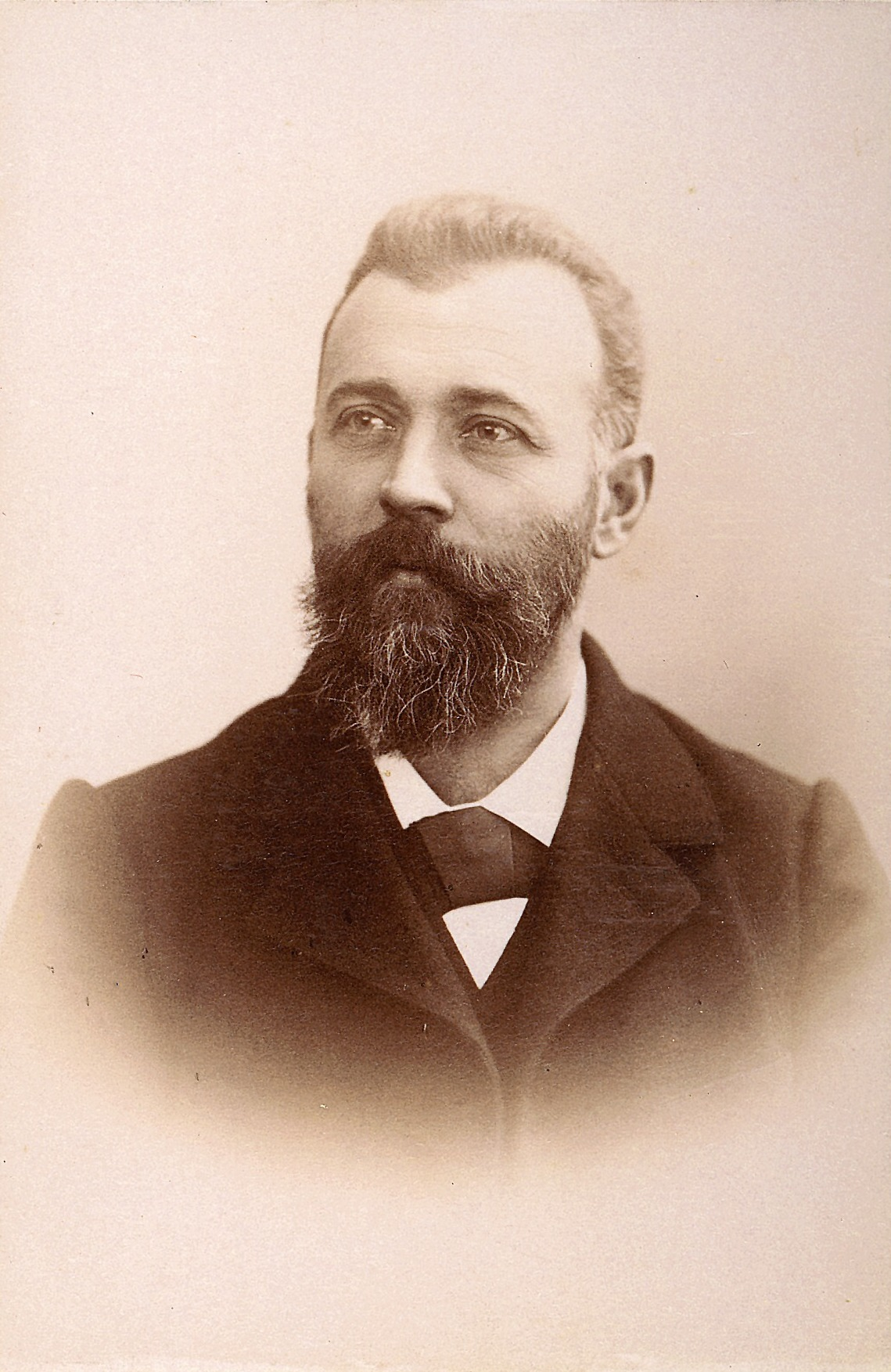 Beschriftung: Prof. Dr. A Wolfer